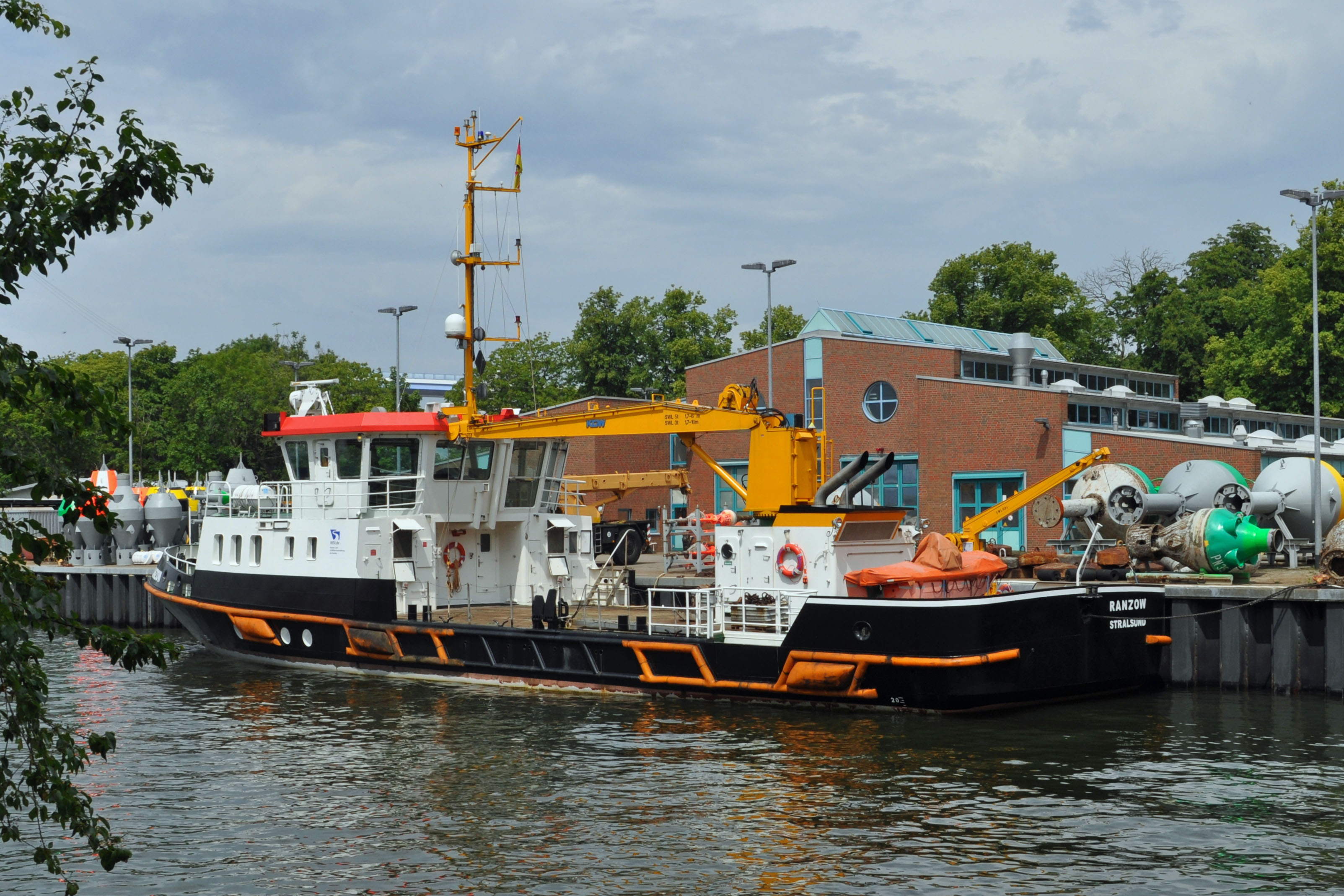 Schiffe vor der Volkswerft Stralsund. am Tonnenhof auf dem Dänholm